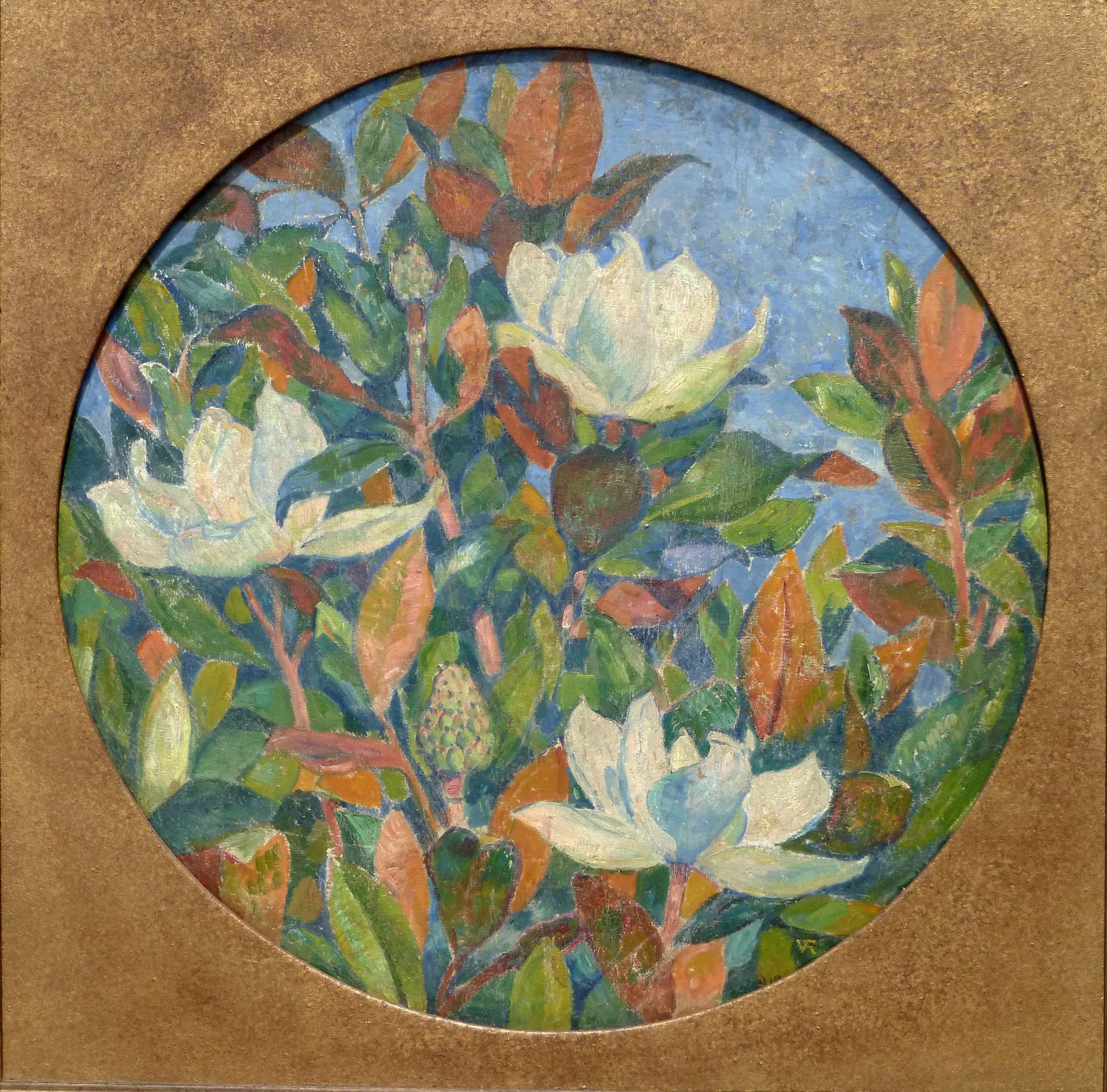 "Magnolias" (1910), olie op doek (met monogram en met datum) door Théo Van Rysselberghe (1862-1926); privé-collectie; vermeld in de Catalogue raisonné van Ronald Feltkamp ISBN 2-87386-222-X; eveneens vermeld in het boek "Dictionnaire van Bloemenschilders, Belgische en Hollandse kunstenaars geboren tussen 1750 en 1880" (N. Hostyn en W. Rappard; ISBN 90-74524-05-2